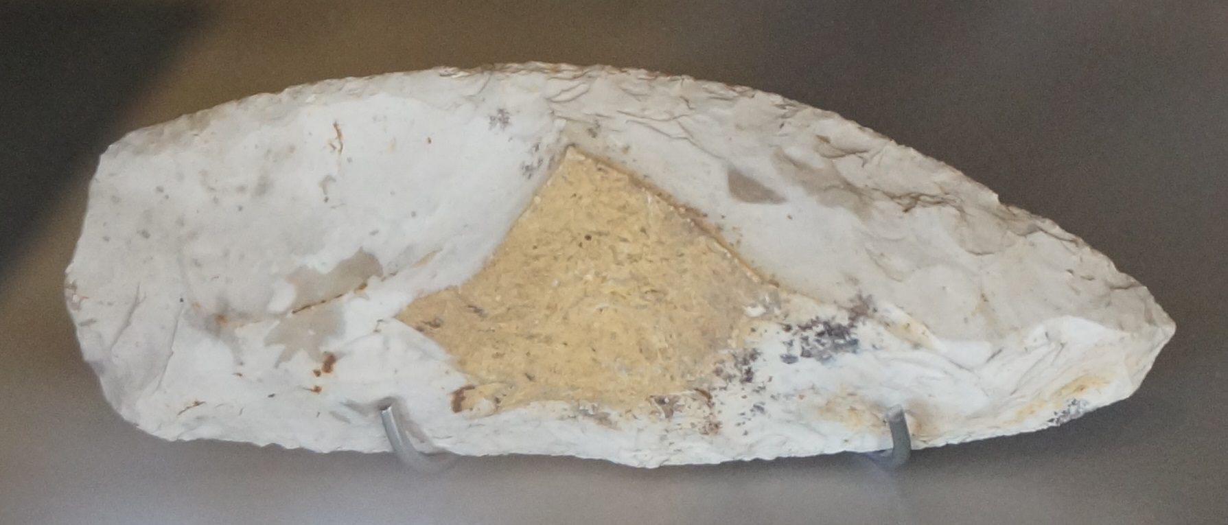 dans la salle d'archéologie.